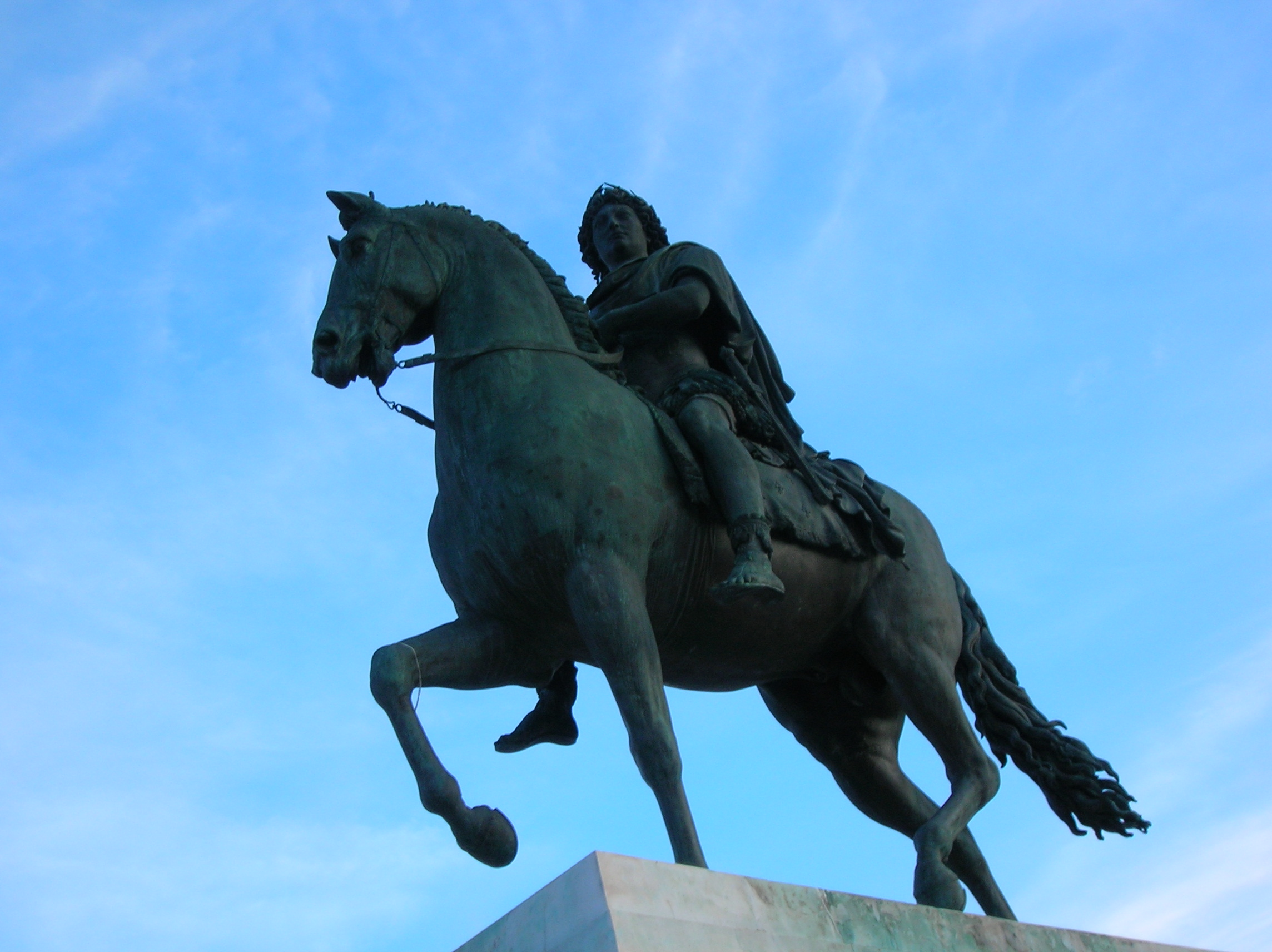 Statue de Louis XIV sur la Place Bellecour à Lyon.